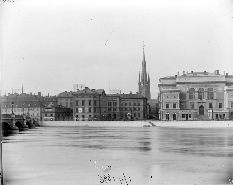 Rödbotorget med Norrström framför. I bakgrunden Klara kyrka Foto Nyckelord Plats: Kvarteret NORRSTRÖM. Kvarteret RÖDA BODARNE. Kvarteret UTTERN. Rödbodtorget. Norrmalm. Tid: 1 april 1896 Ämne: Kyrkor. Broar. Torg. Konstskolor. Keyserska huset Referenser Upphov: Okänd. Tid: 1 april 1896 Beteckning: Fotonummer Fa 50514 ; Fotonummer C 1510